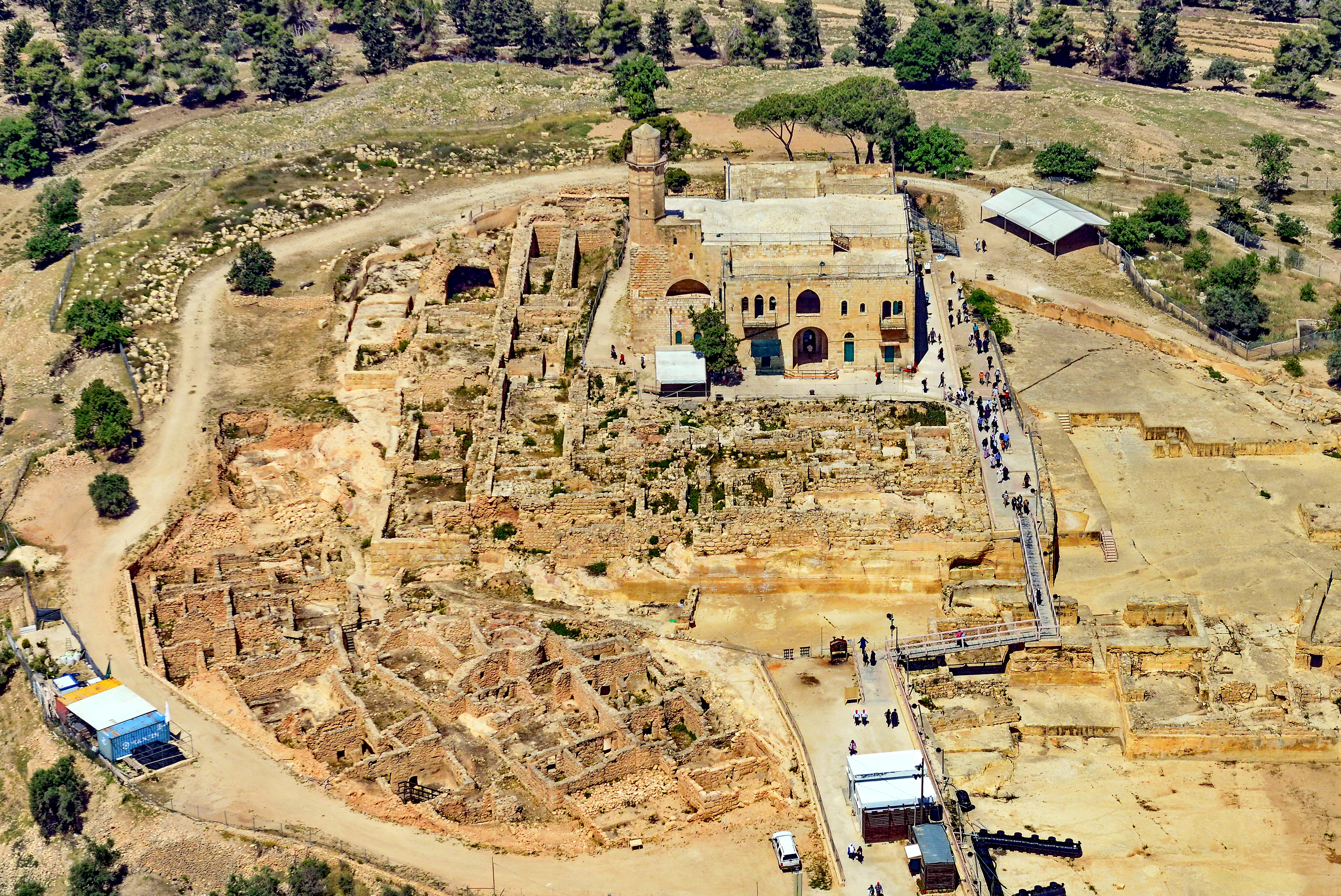 נבי סמואל #מכונה גם: קבר שמואל הנביא בערבית: אַ-נַבִּי צַמְוִיל# הוא אתר המקודש לשלוש הדתות המונותיאיסטיות כמקום קבורתו של שמואל הנביא. הוא שוכן בפסגת הר, צפונית-מערבית לירושלים, כקילומטר אחד משכונת רמות. המבנה הבולט ביותר בשטח הוא מצודה צלבנית גדולה, שהשתמרה לגובה של שתי קומות.